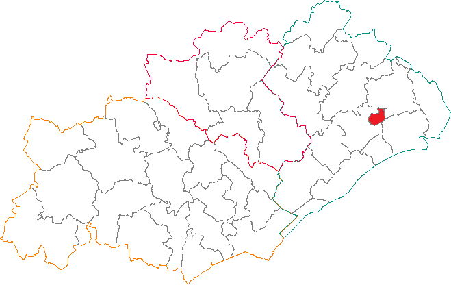 Situation du canton dans le département de l'Hérault.